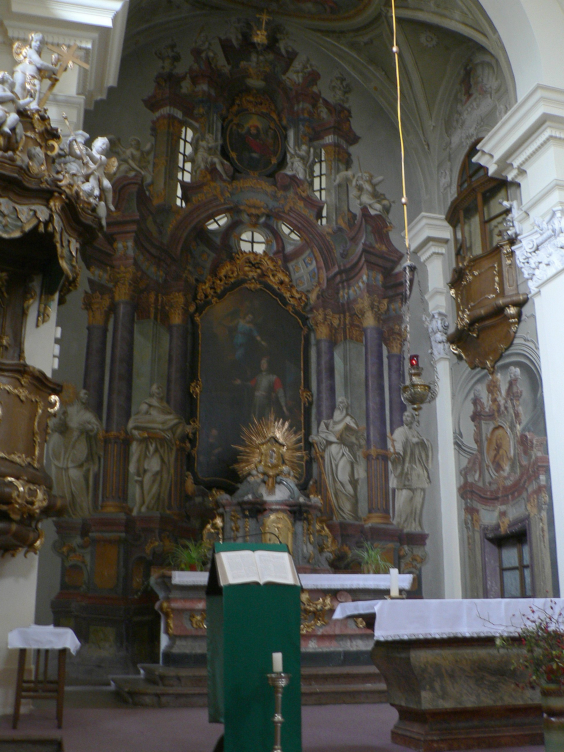 Hlavní oltář kostela sv. Víta v Tuchoměřicích